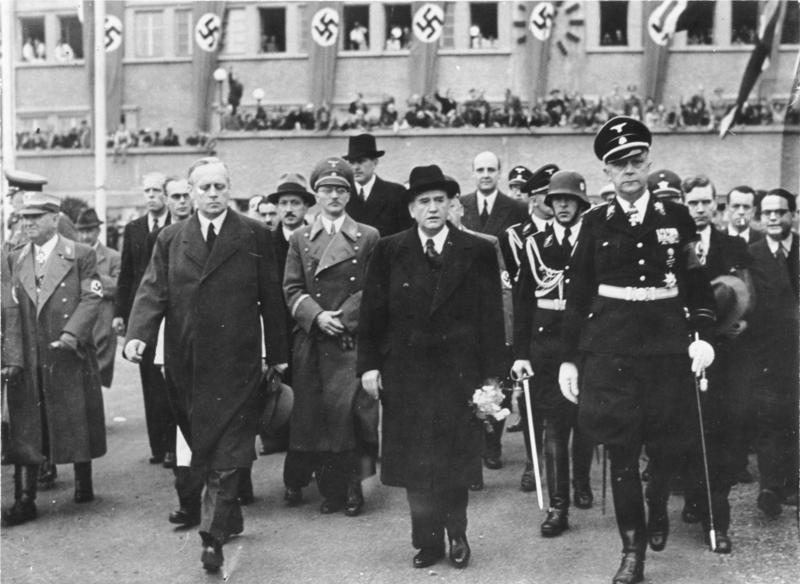 München, Abflug des franz. Ministerpräsidenten Daladier